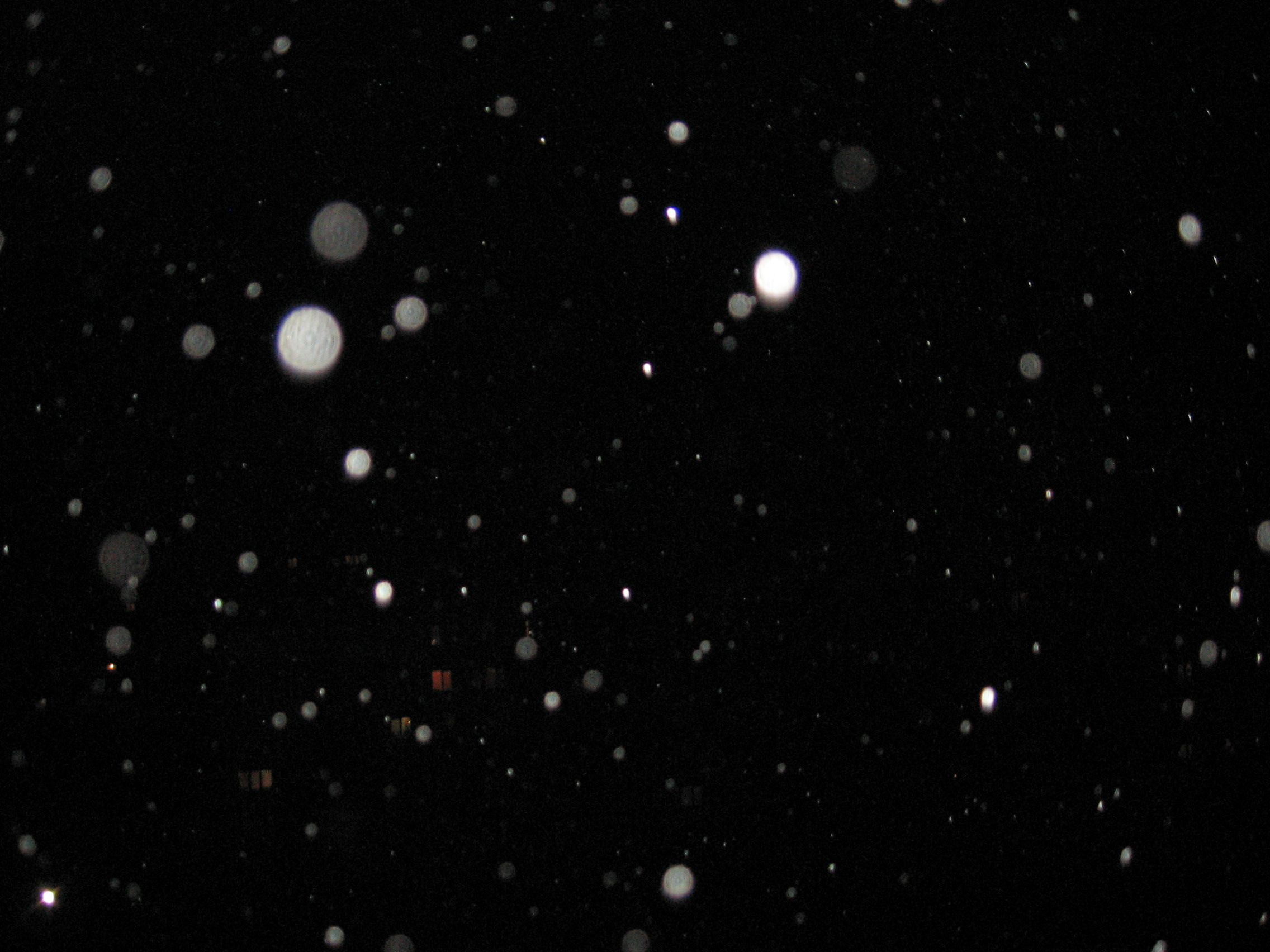 дощ: Фото